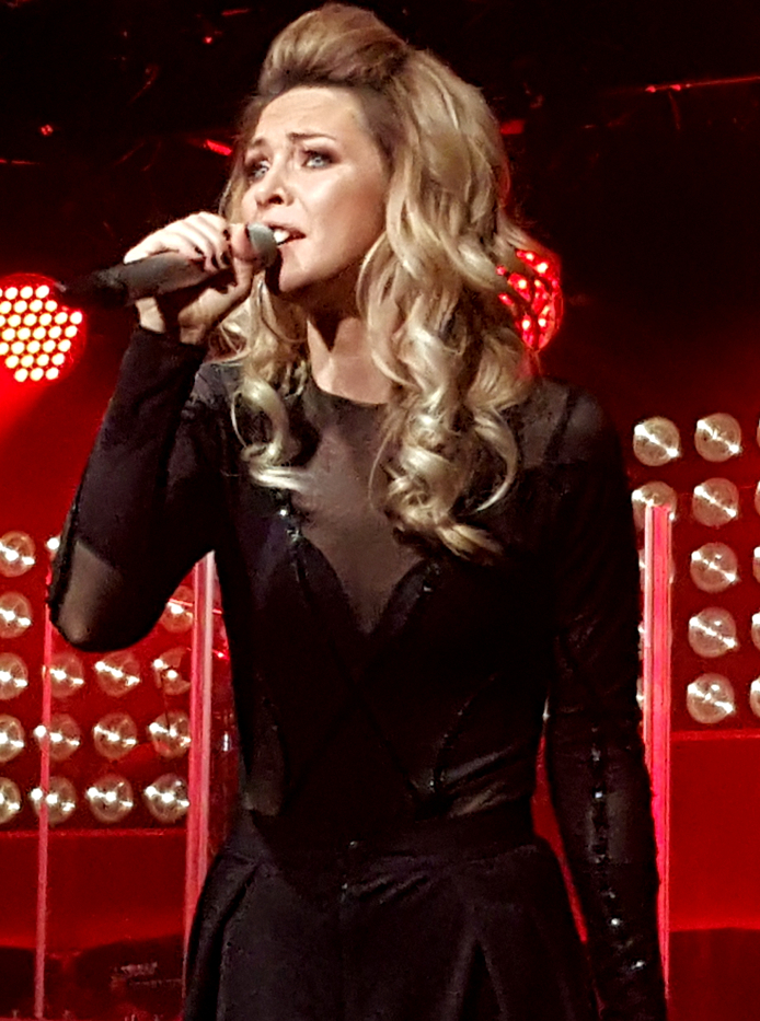 Polska piosenkarka Magdalena Tul podczas koncertu w warszawskim klubie Stodoła w listopadzie 2017 roku.